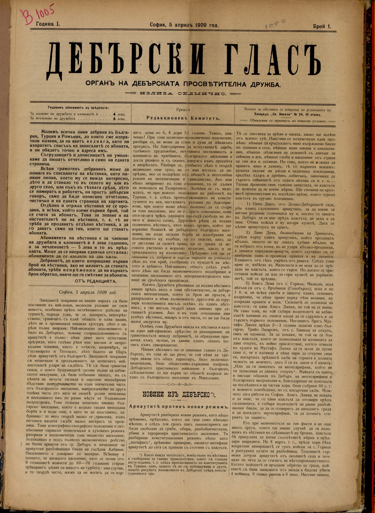 Първа страница на първи брой на вестник "Дебърски глас".